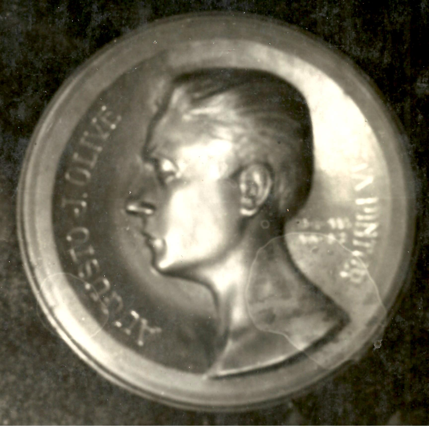 Medallón con retrato del pintor Olivé, en bronce, del escultor Erminio Blotta, en el Cementerio El Salvador, de Rosario, Argentina.